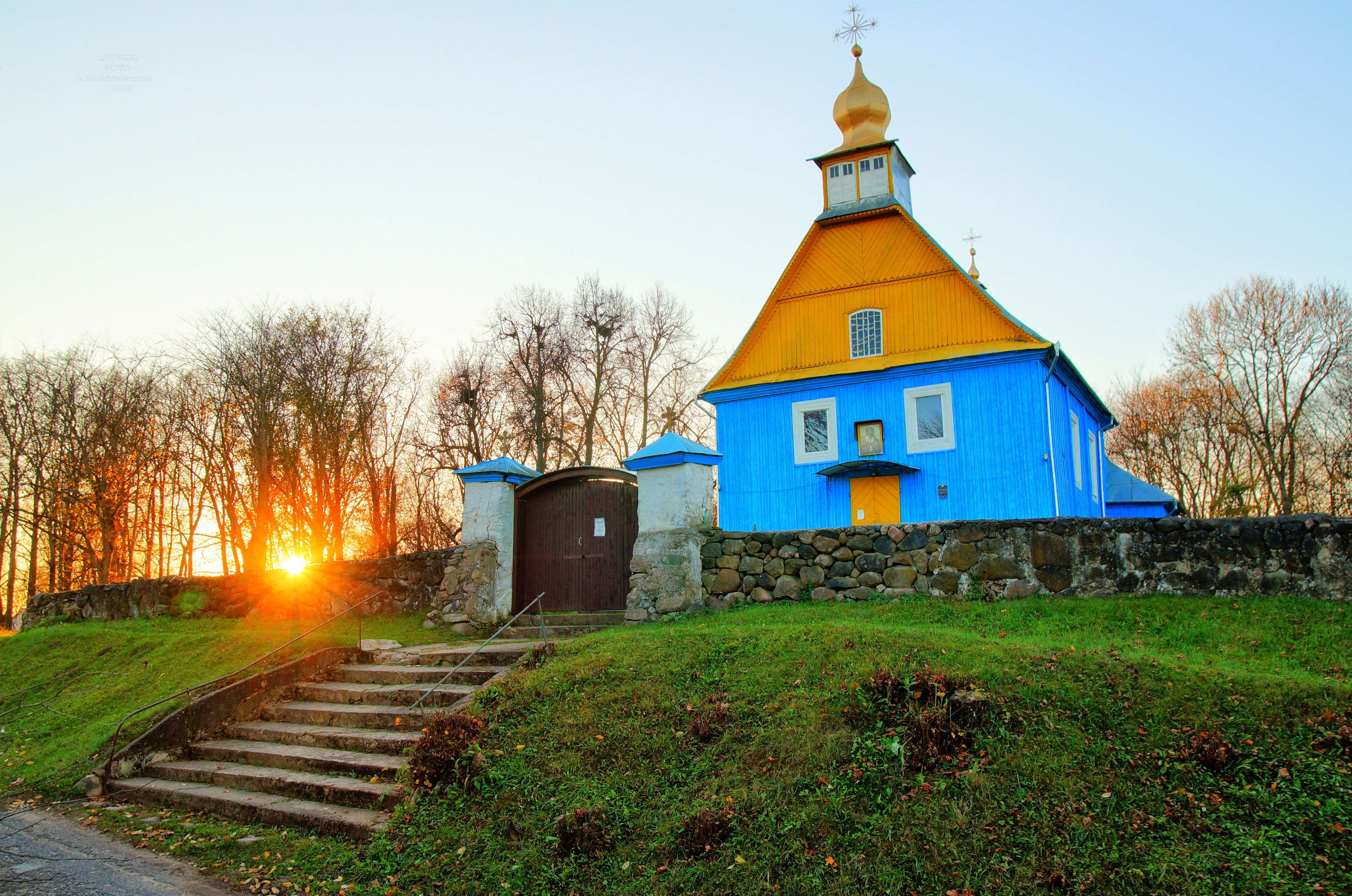 Мікалаеўская царква з брамай і агароджай. в. Латыгаль This is a photo of Belarusian heritage monument. Reference number: 612Г000126 ( WLM)